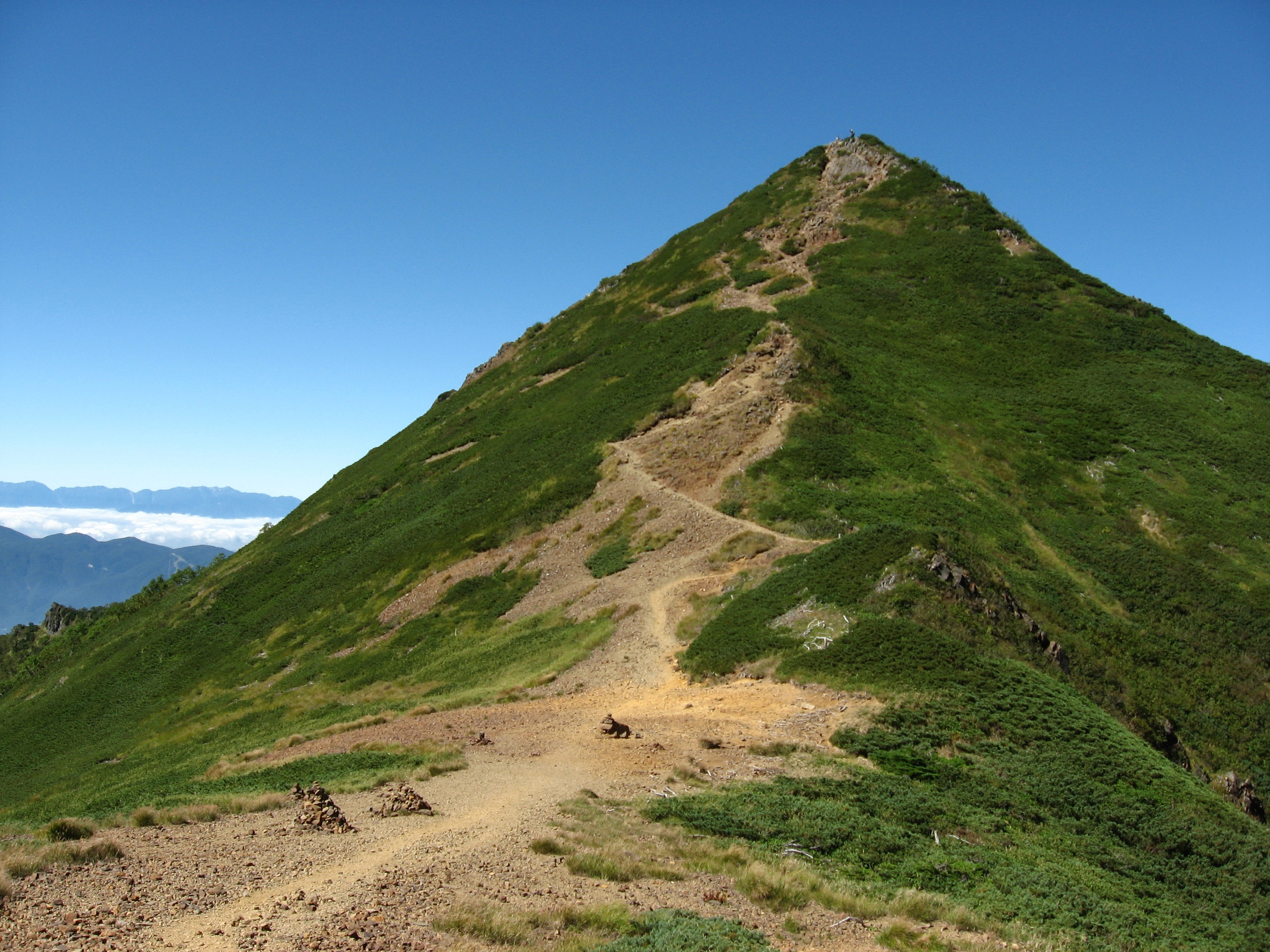 東側から見た中岳